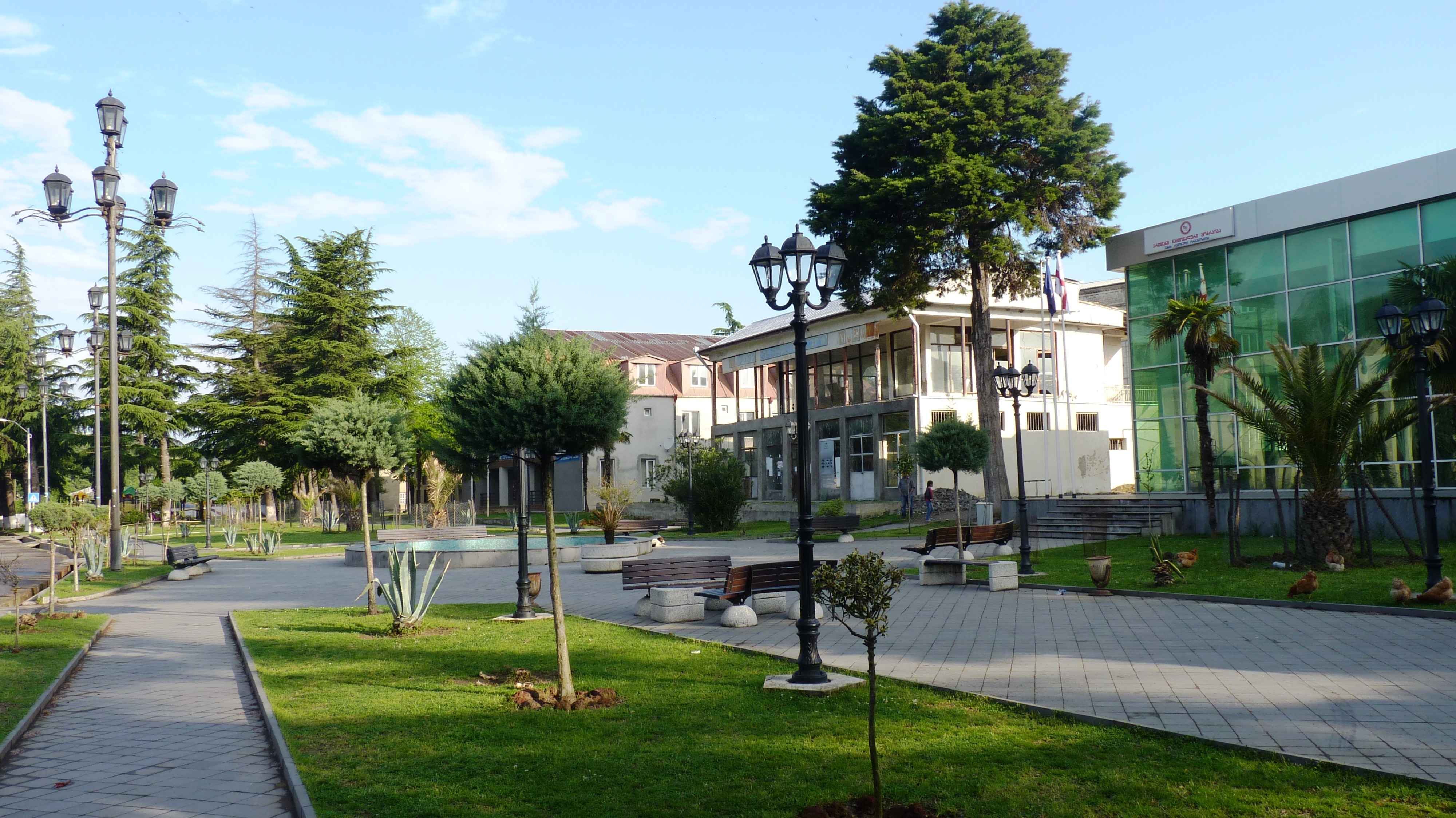 ვანი, თავისუფლების ქუჩა